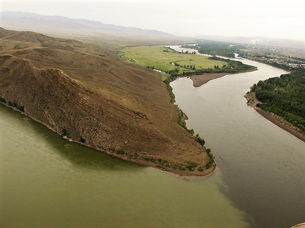 Слияние Бий-Хема и Ка-Хема в Кызыле